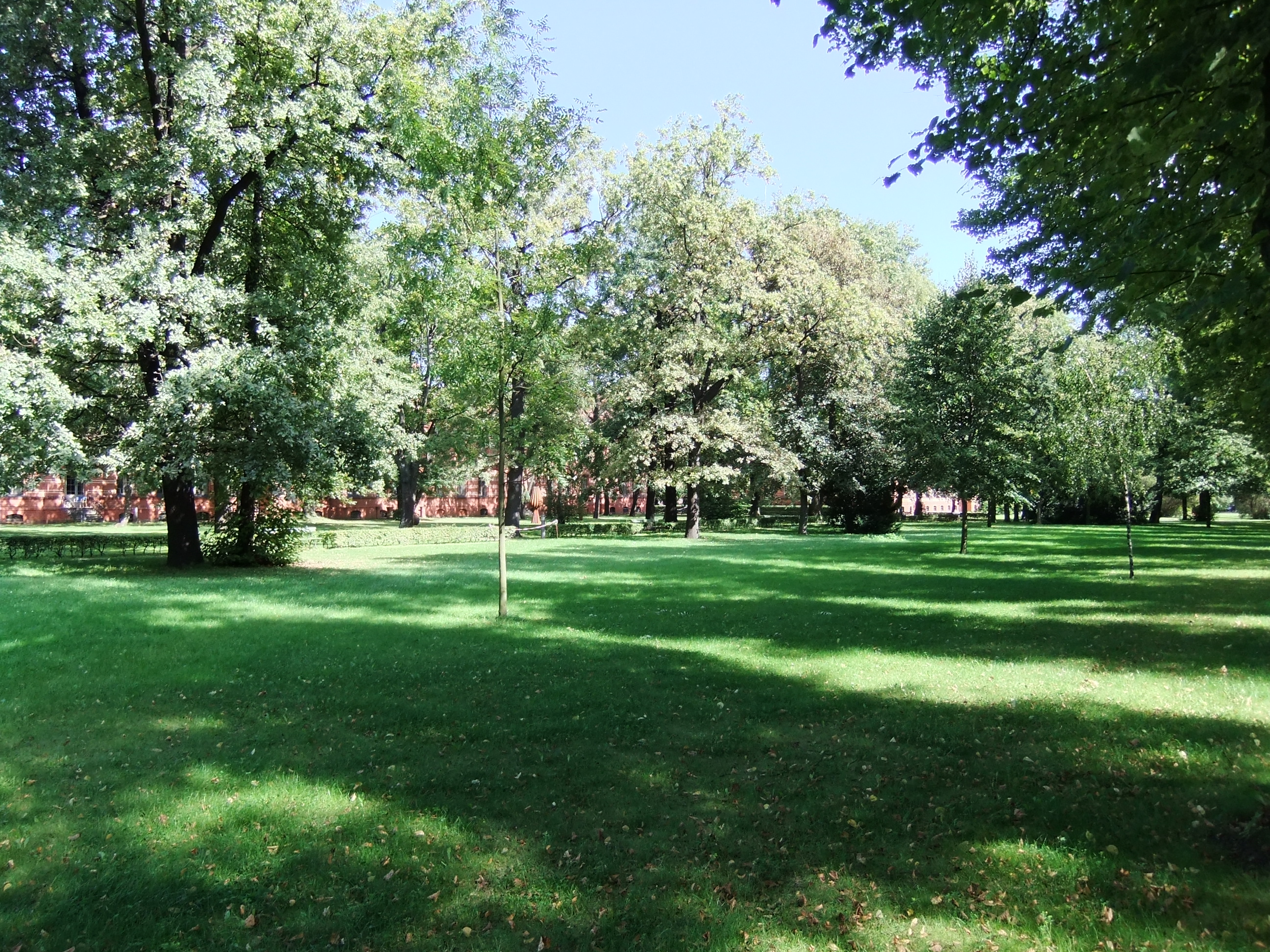 Denkmalliste Berlin OBJ-Dok-Nr.: 09045899- Berlin Lichtenberg, Herzbergstraße 79, Garten der ehem. Städtischen Irrenanstalt Herzberge, 1889-93 von Hermann Blankenstein, Erweiterungen nach 1913 (Gartendenkmale)